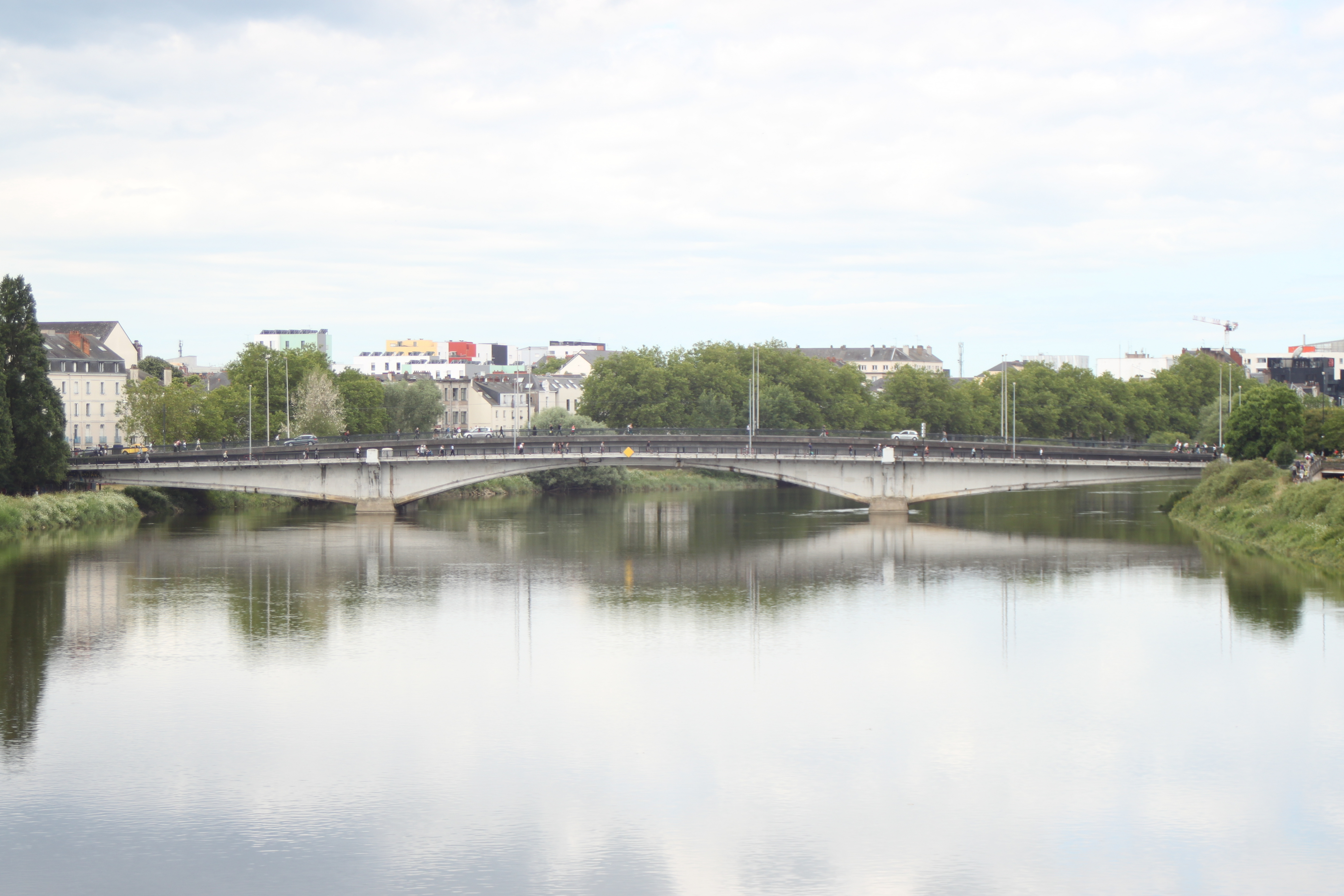 Pont Général-Audibert, Fr-44-Nantes.